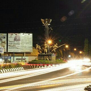 Tugu Pancasila Blora saat malam hari